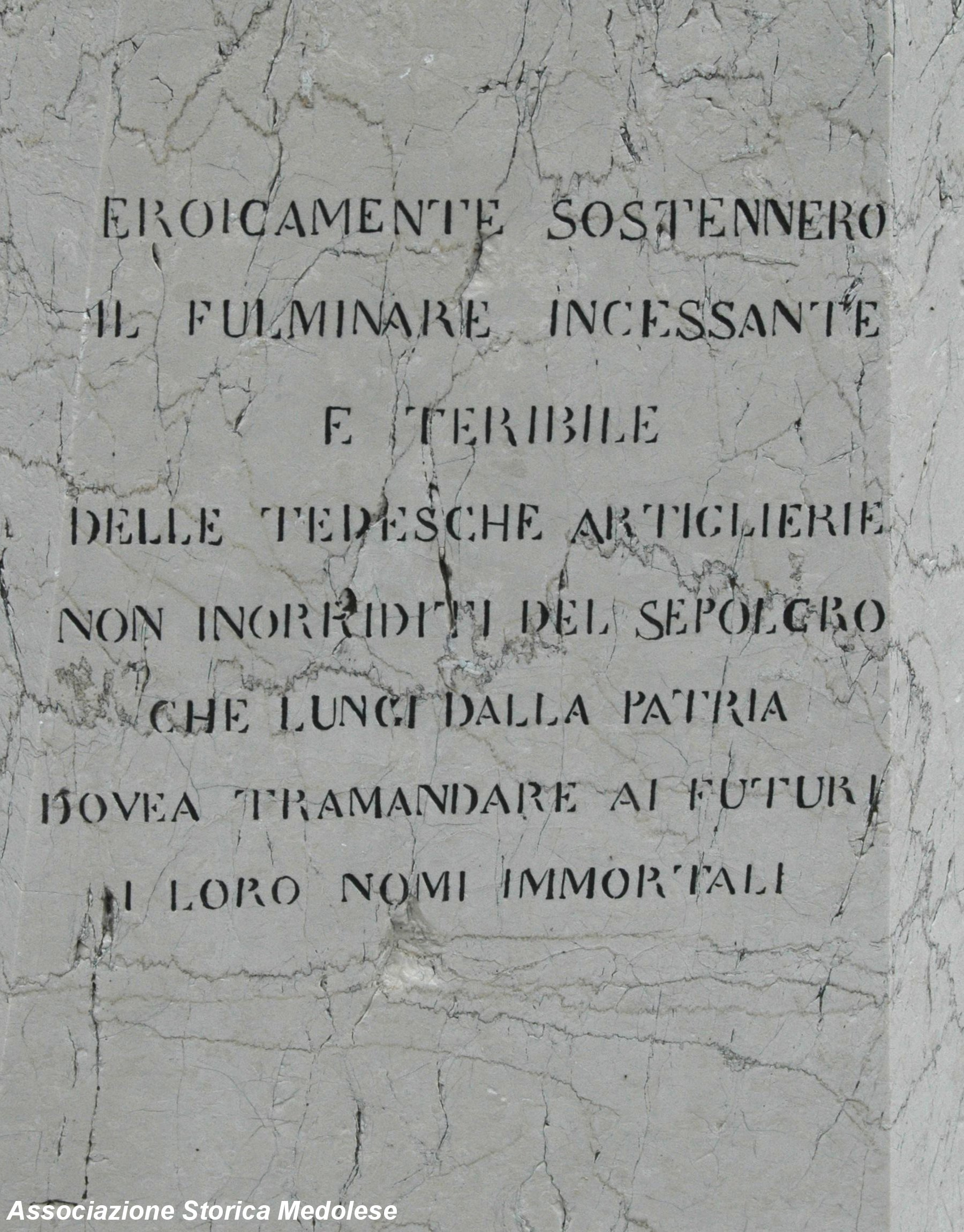 Iscrizione Tomba d'onore di Ca' Fattori. Lato 4